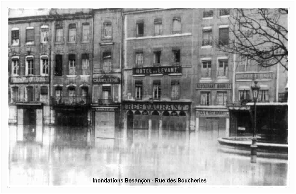 La rue des Boucherie lors de la crue de 1910 à Besançon (Doubs, France).